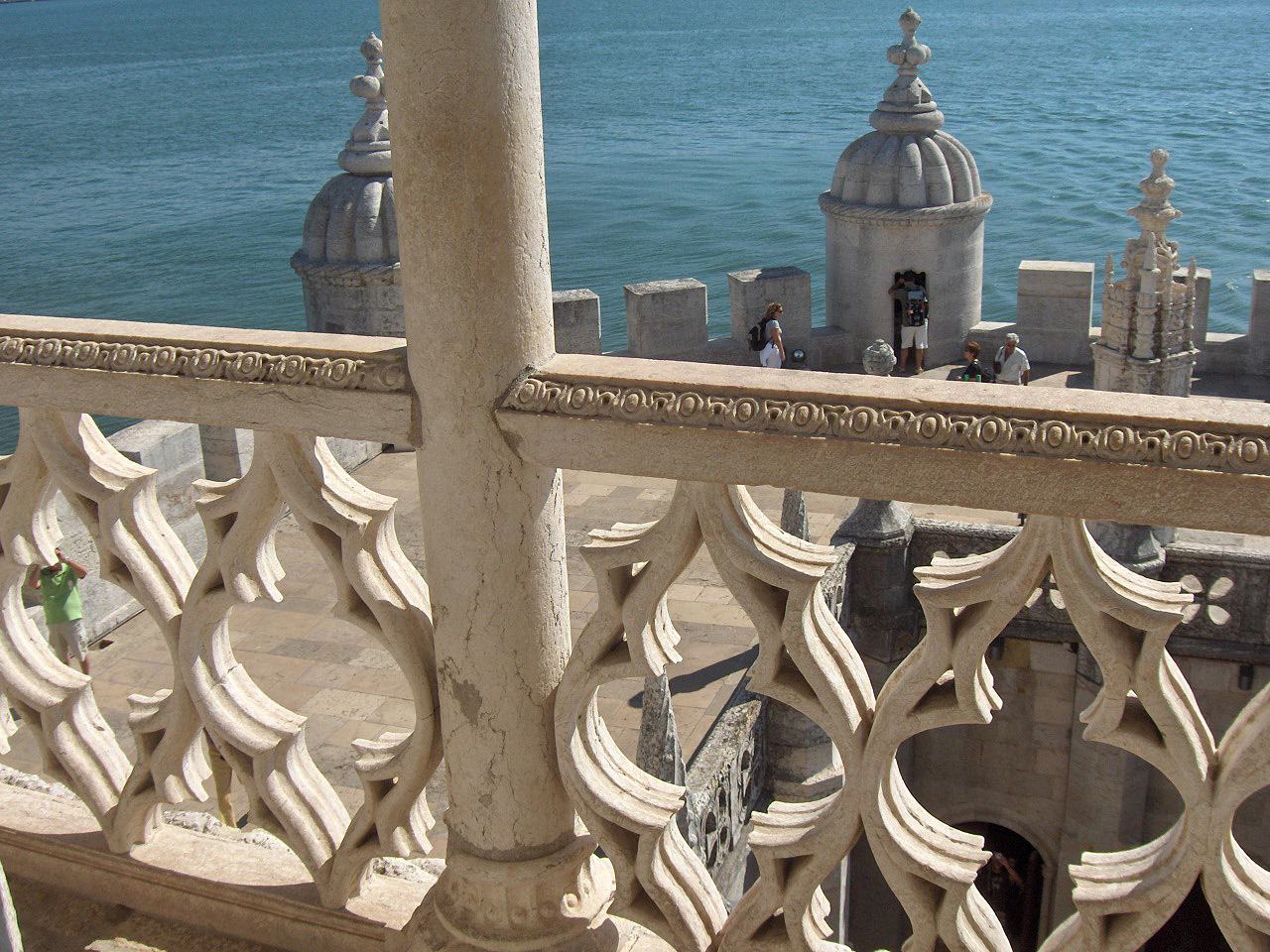 Torre de Belém ,Belém (Lisbon), Portugal